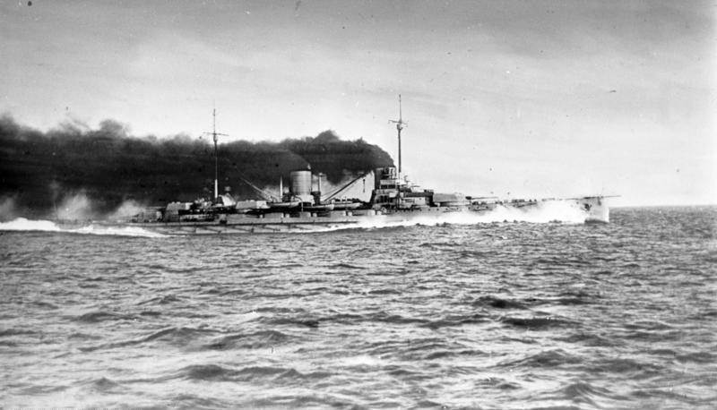 Panzerkreuzer "SMS Goeben" Panzerkreuzer / Großer Kreuzer / Schlachtkreuzer "S.M.S. Goeben" der Moltke-Klasse, später unter türkischer Flagge in voller Fahrt auf See, Ansicht der Steuerbord-Seite